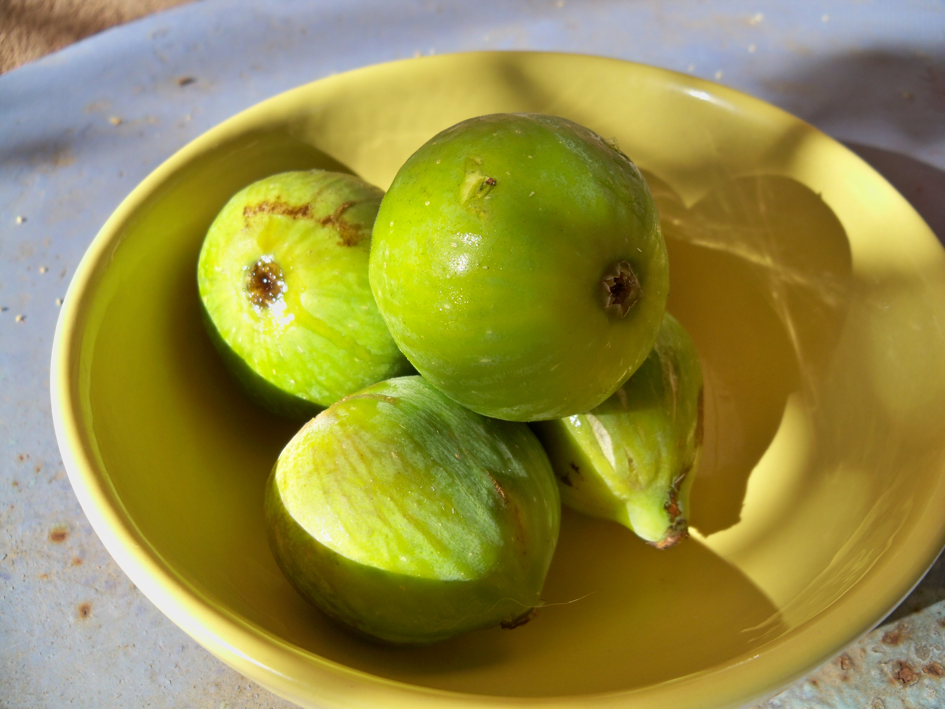 Figues Goute d'Or, connues également sous les nom figues de Marseille ou " Couille du Pape "